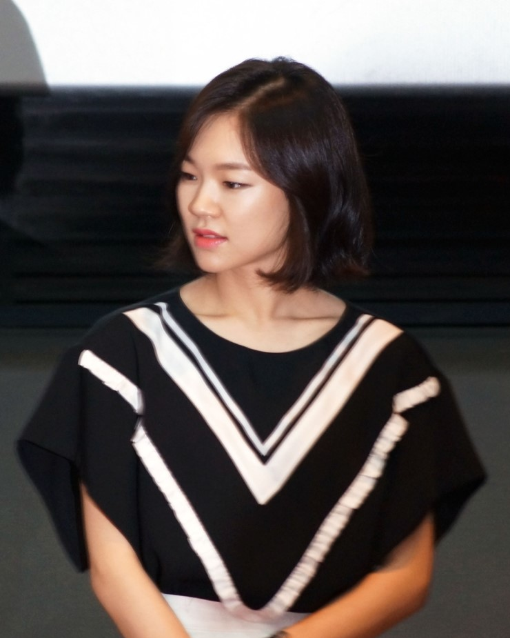 2014년 8월 20일 서울 영등포 롯데시네마에서 영화 《해무》 무대인사 중인 한예리.